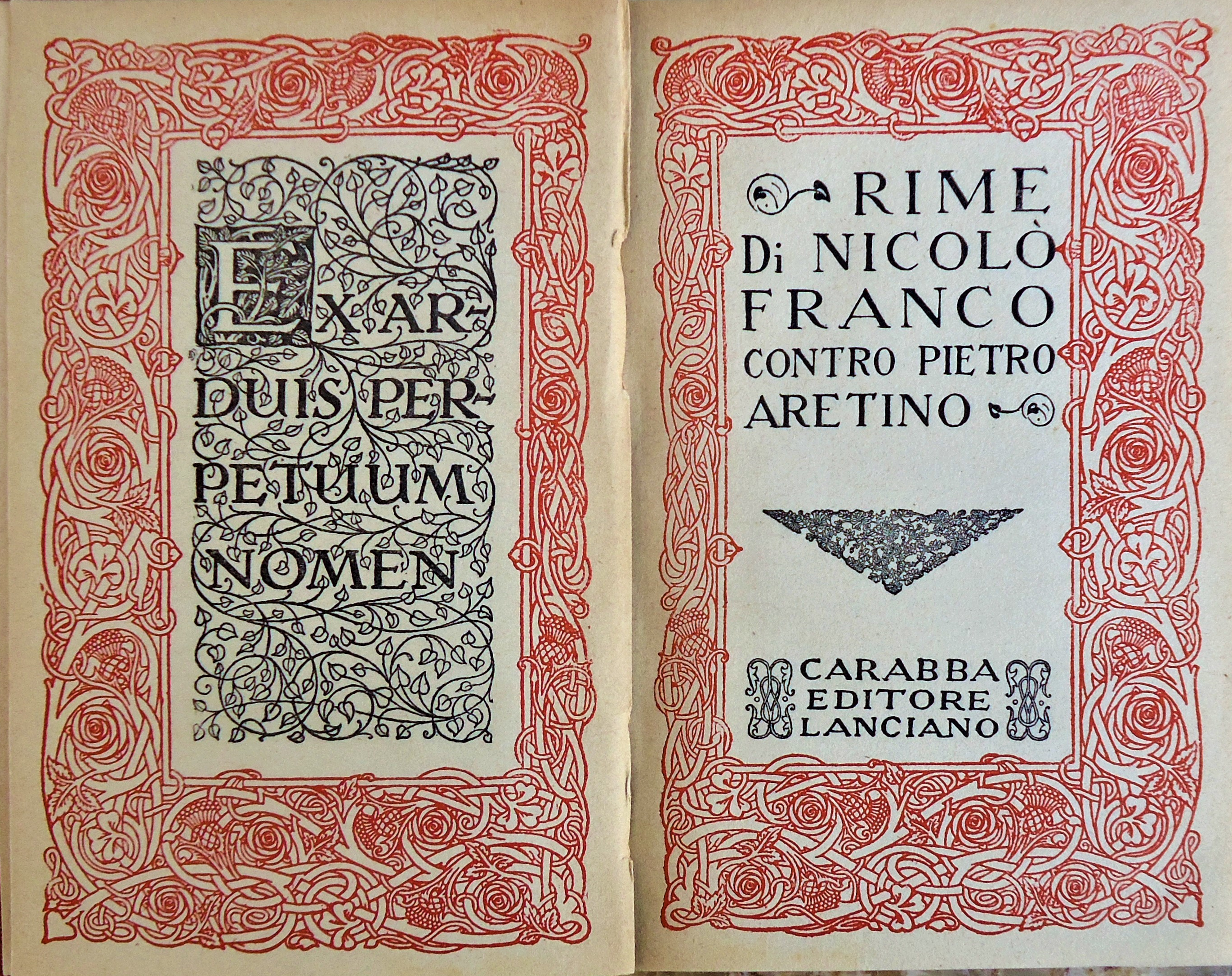 Collana Scrittori italiani e stranieri. Introduzione a firma E. S..